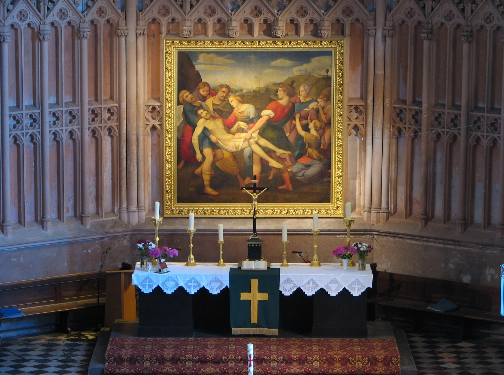 Kreuzabnahme Christi - Kopie eines Gemäldes von Raffael, 1825 von Prof. Heinrich Lengerich in Rom angefertigt